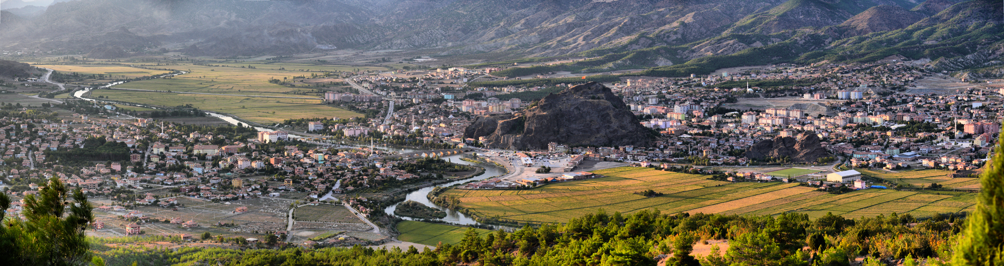 Osmancık panaroması.